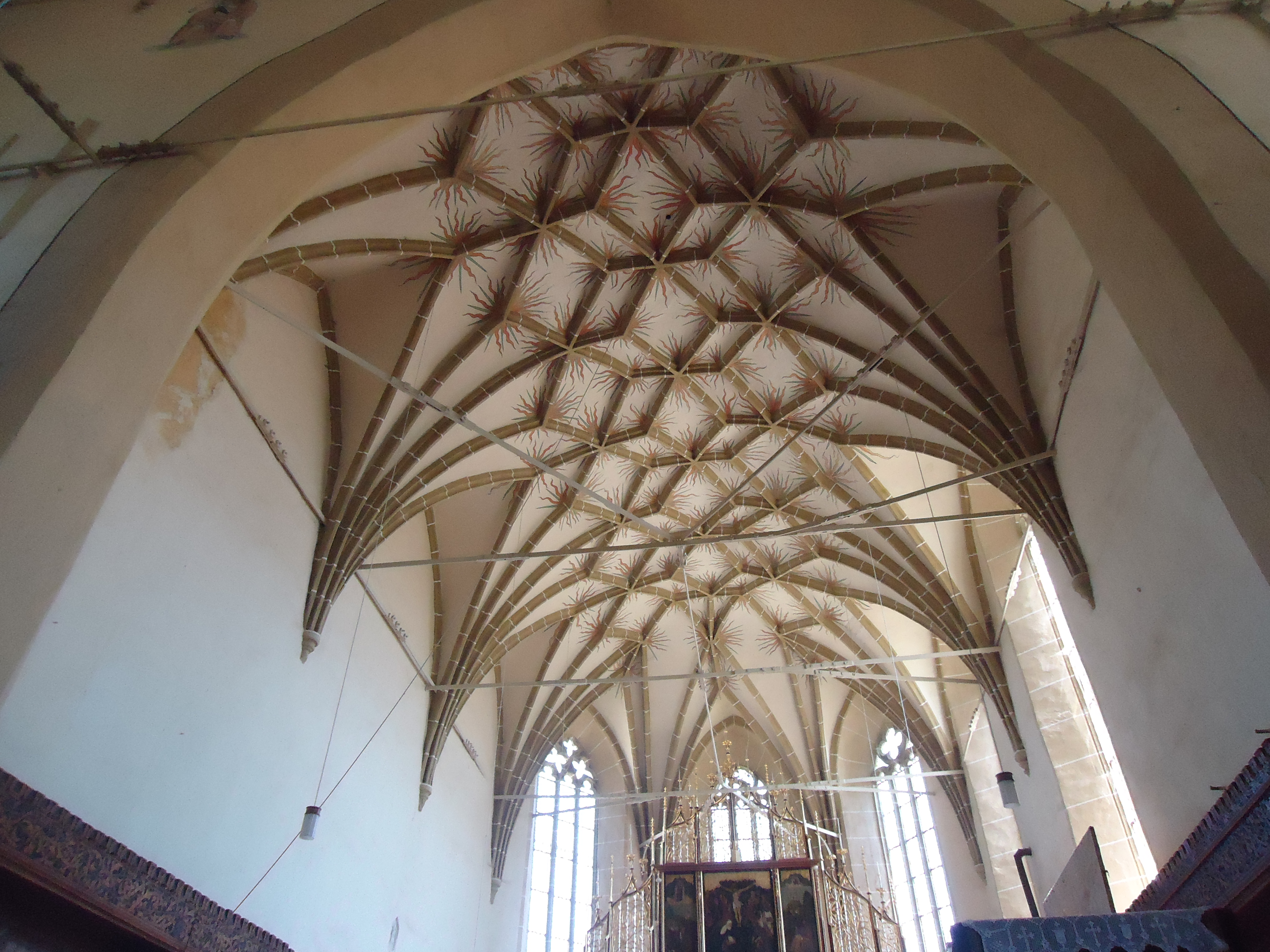 Tavanul bisericii fortificate din Biertan 01